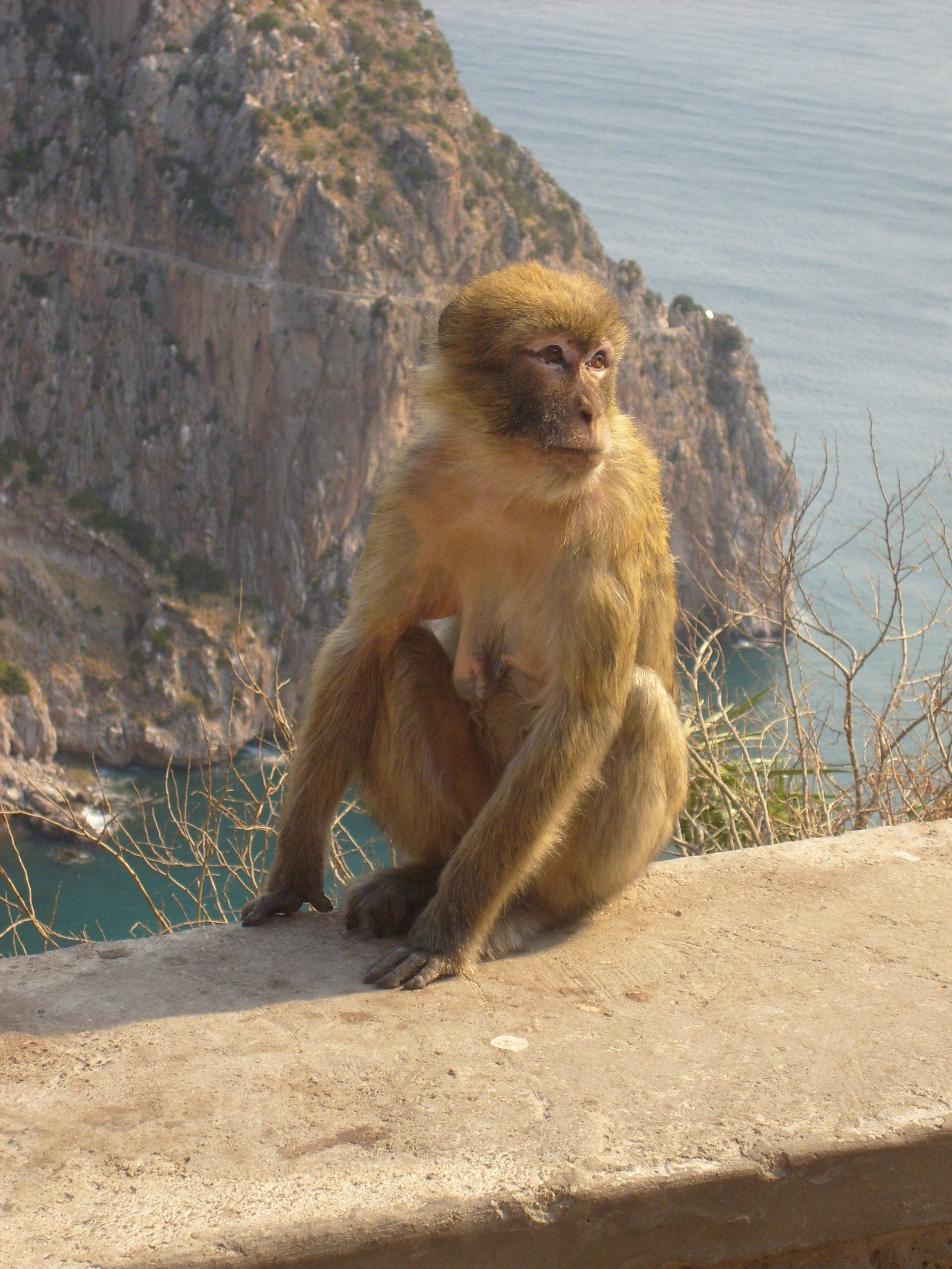 Corniche